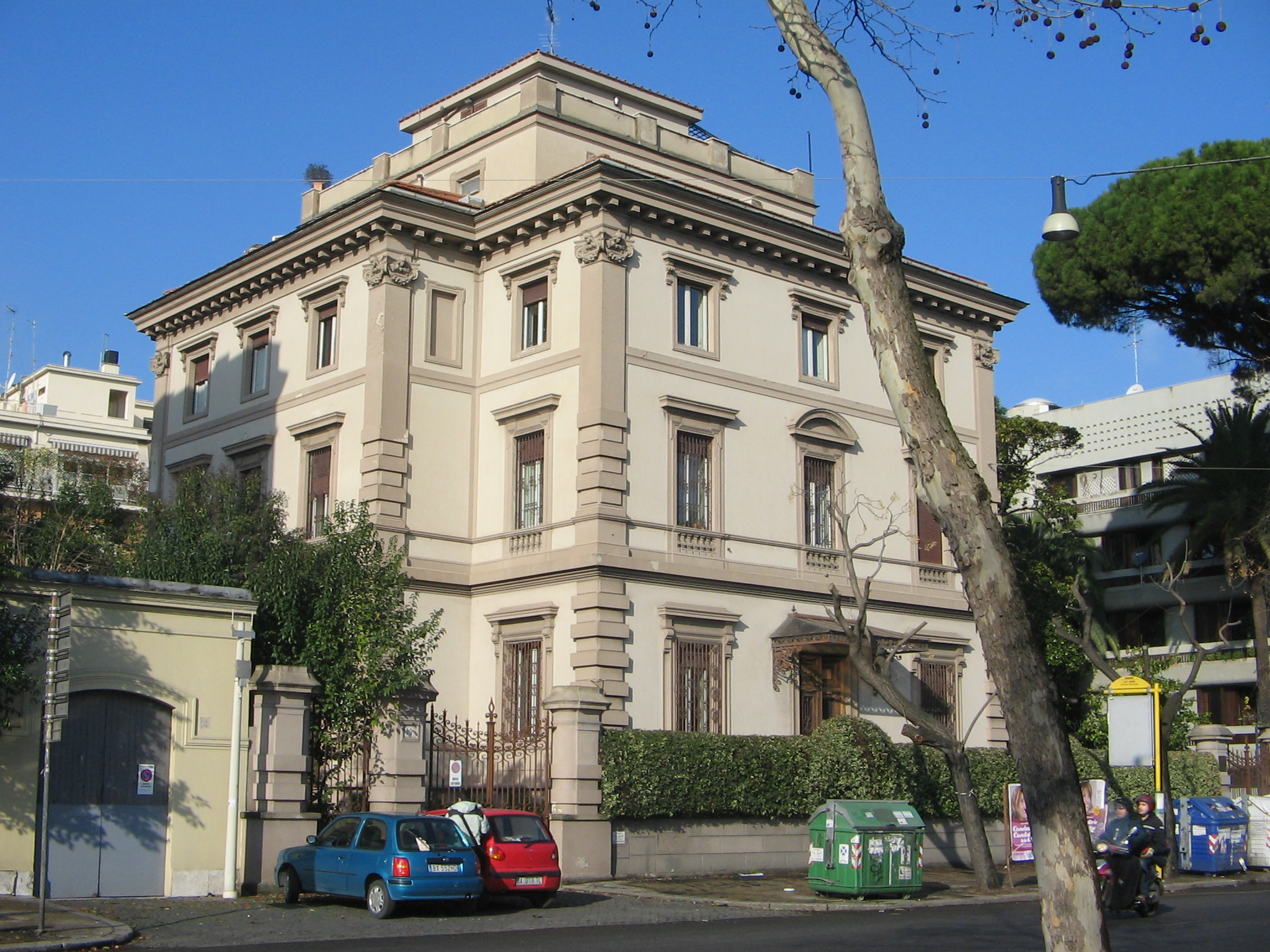 Un villino primo novecento a Roma, nel quartiere Della Vittoria Lungotevere delle Armi